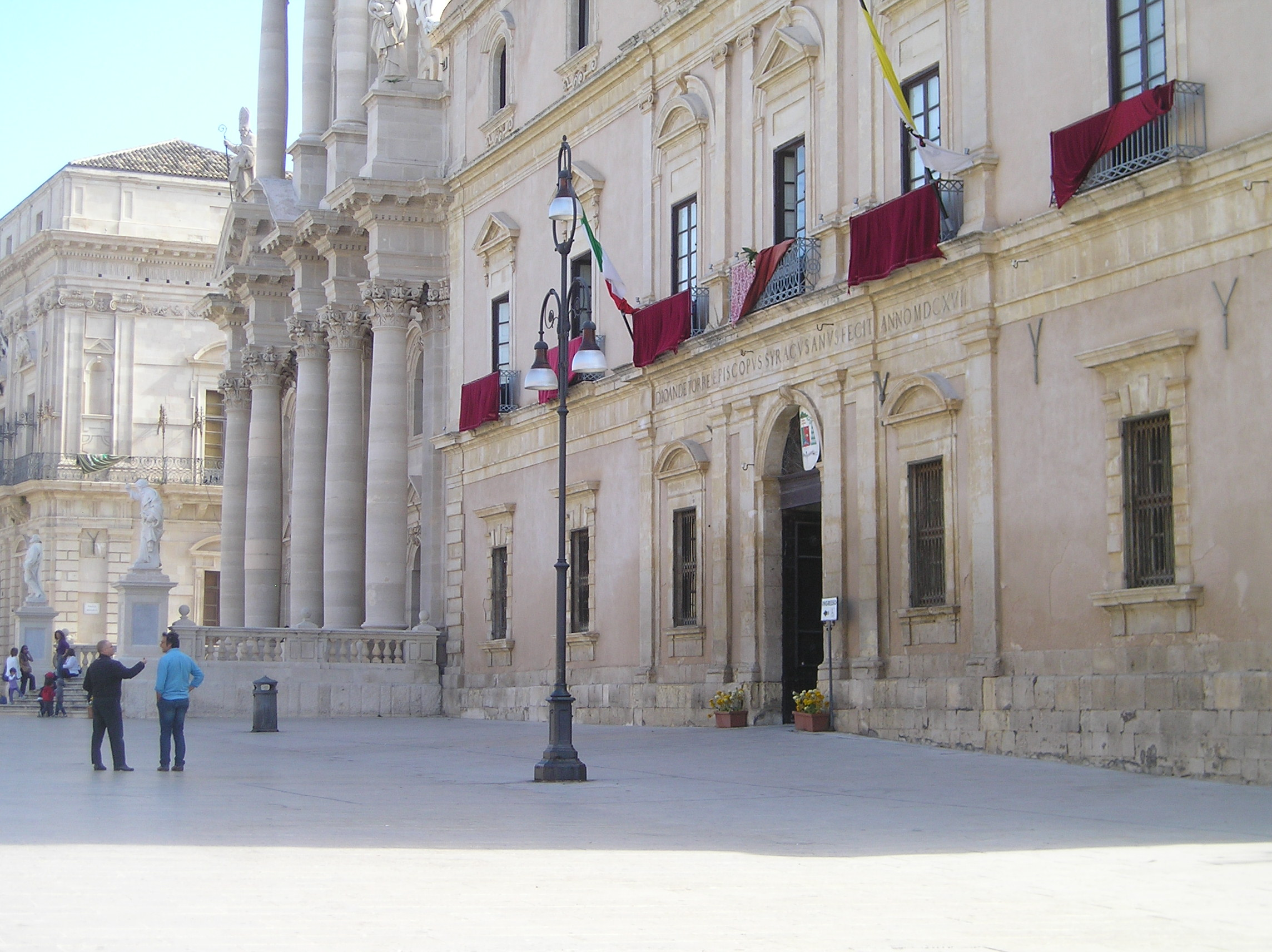 Palazzo Arcivescovile di Siracusa - Piazza Duomo